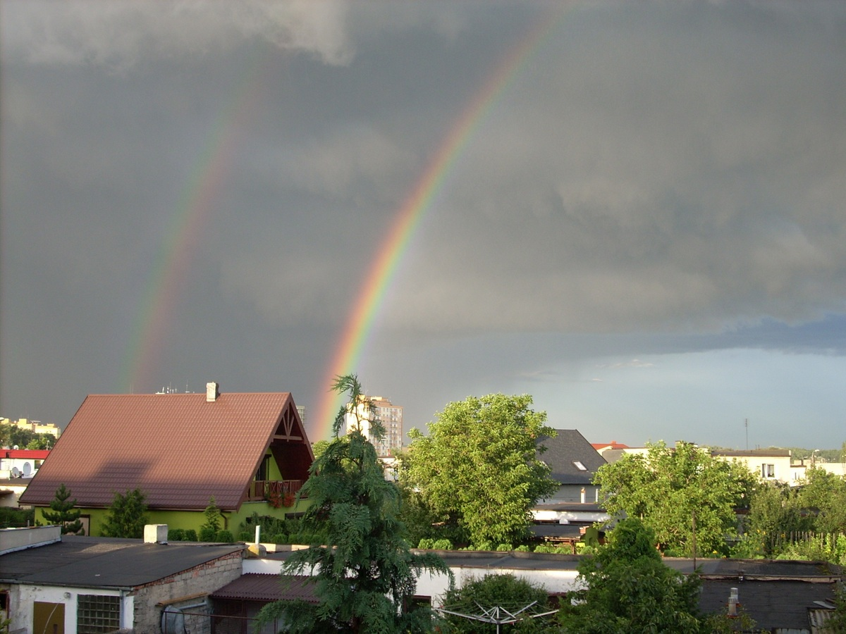 Zjawisko podwójnej tęczy.